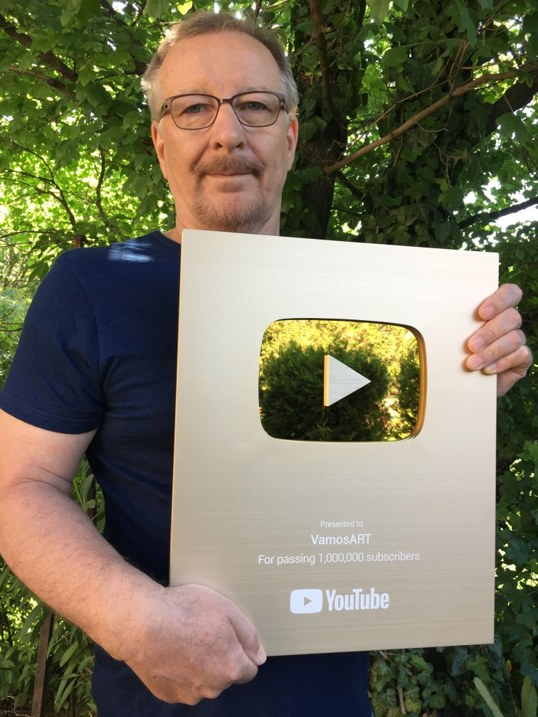 A YouTube az egymillió rajongó elismeréseként arany plakettet küld az alkotónak.